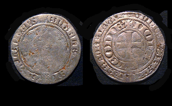 Gros au buste, d'Englebert de la Marck. Cette monnaie d'argent provient du trésor de Seraing.